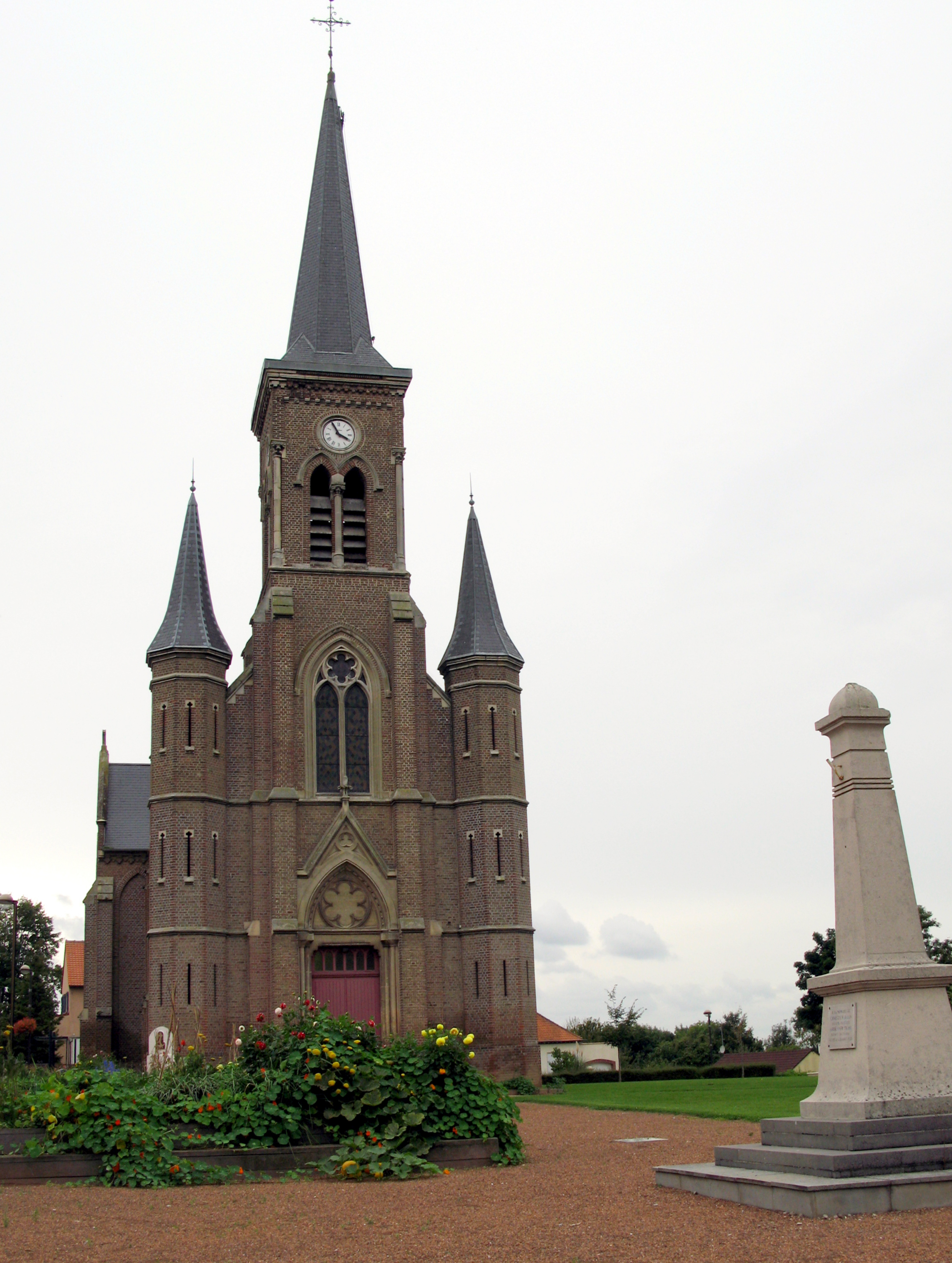 Glisy (Somme, France) - L'église et le monument-aux-morts. . . .